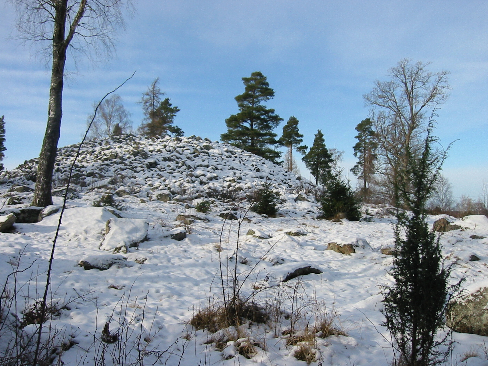 Gravröset i Värperör strax utanför Kolbäck, Hallstahammars kommun.